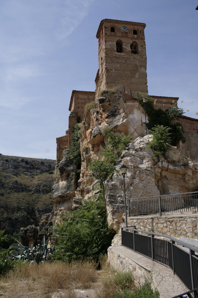 unidentified Spain